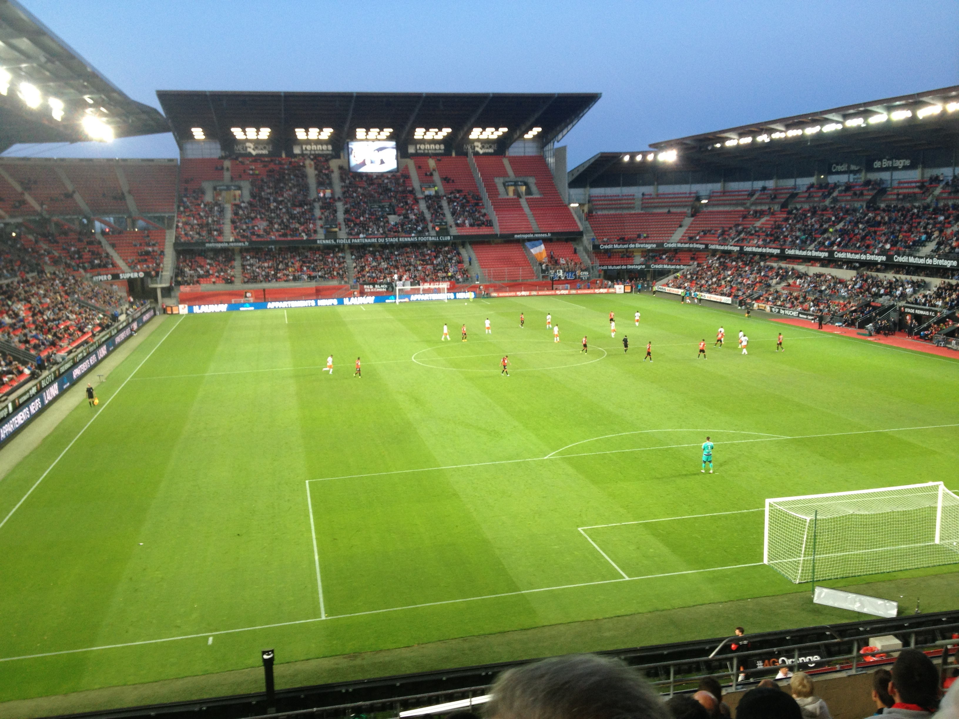 Scène du match opposant le Stade rennais et le Montpellier HSC au Roazhon Park, comptant pour la deuxième journée de Ligue 1 2015-2016.